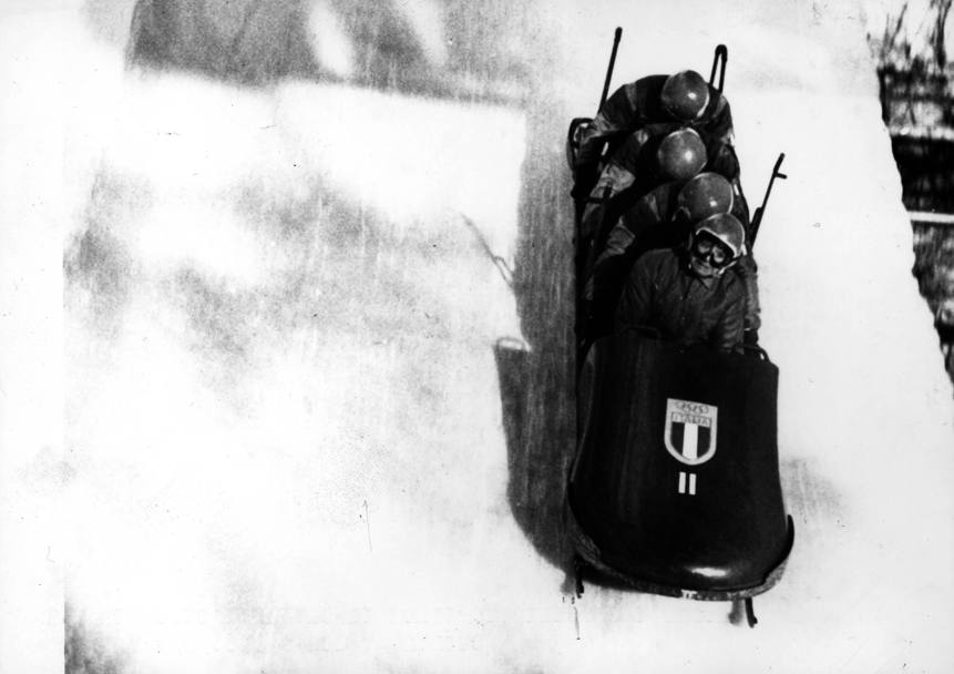 L'equipaggio di Eugenio Monti nel bob a quattro "Italia II" vincitore della medaglia d'argento alle olimpiadi invernali di Cortina 1956